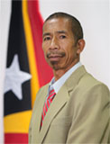 José Pacheco Soares, Abgeordneter des Nationalparlaments Osttimors